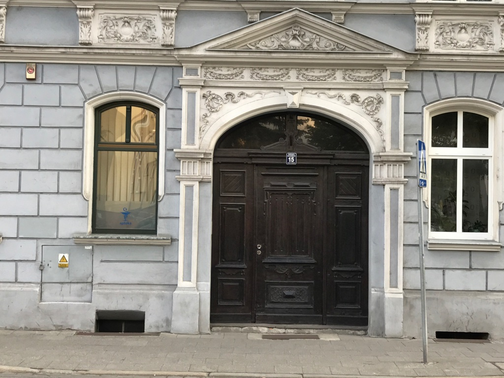 Kamienica przy ul Wojska Polskiego 1